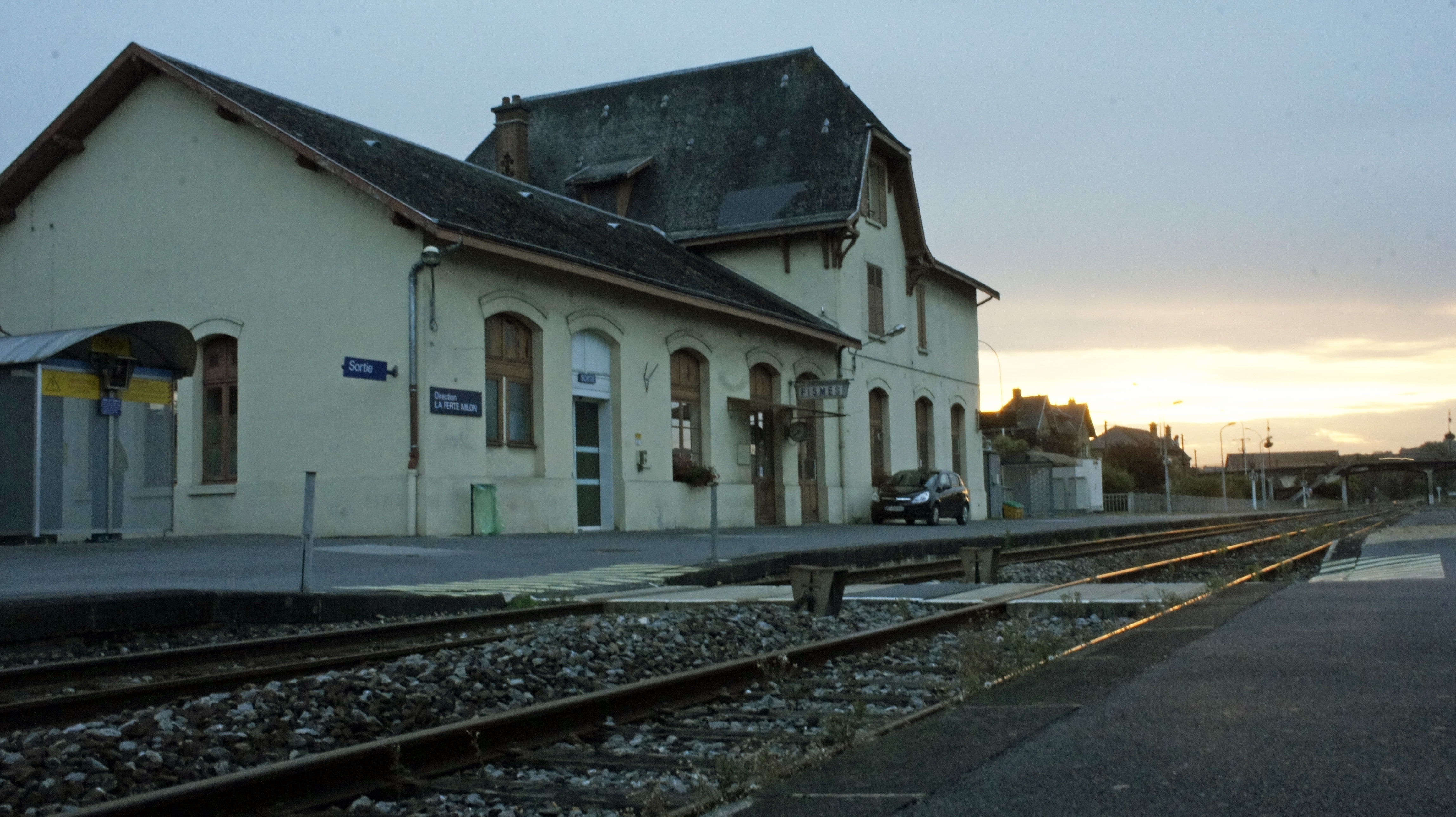 Vue depuis les places d'attente de la gare de Fismes.